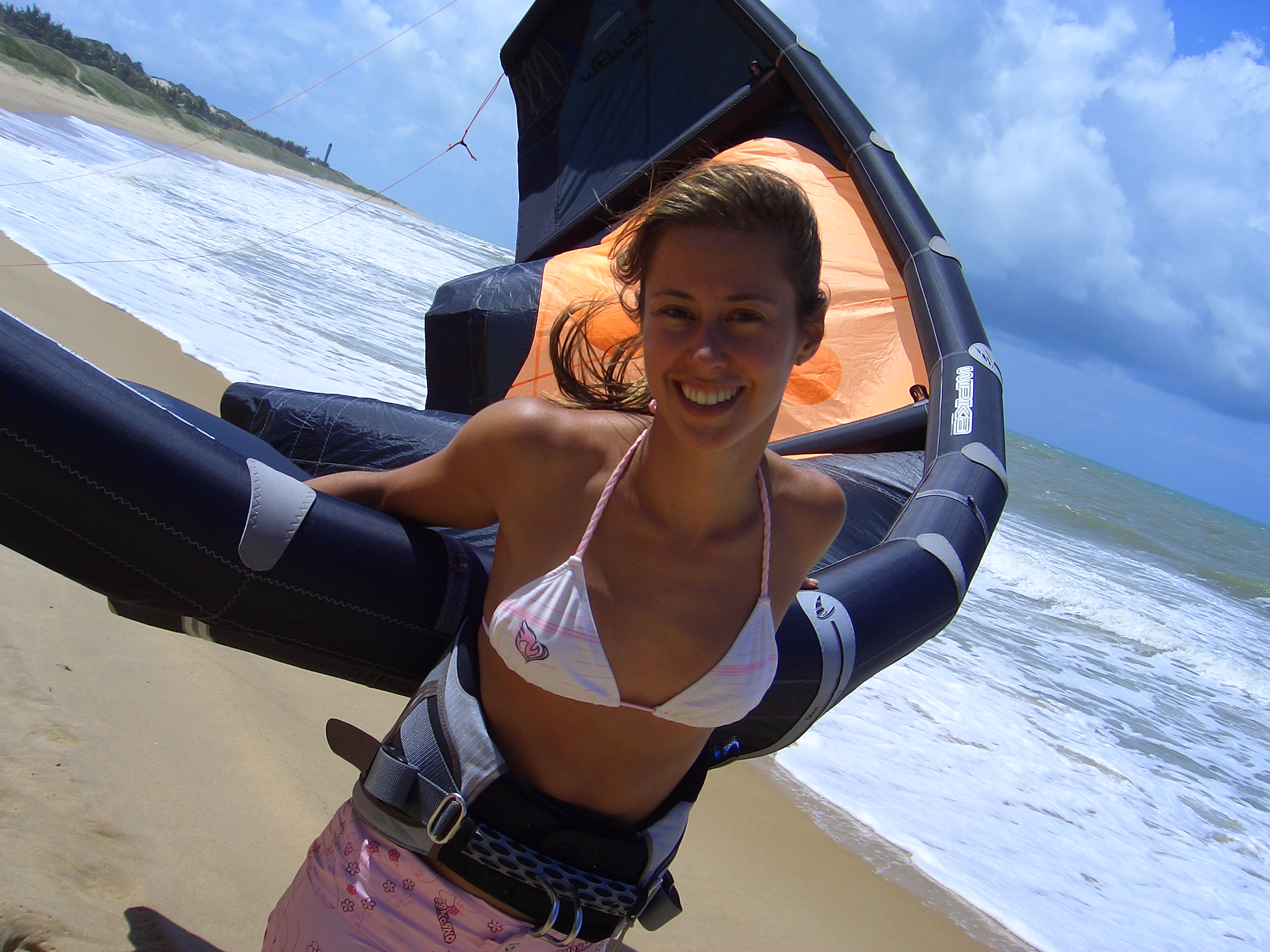 Dani na praia com seu kite